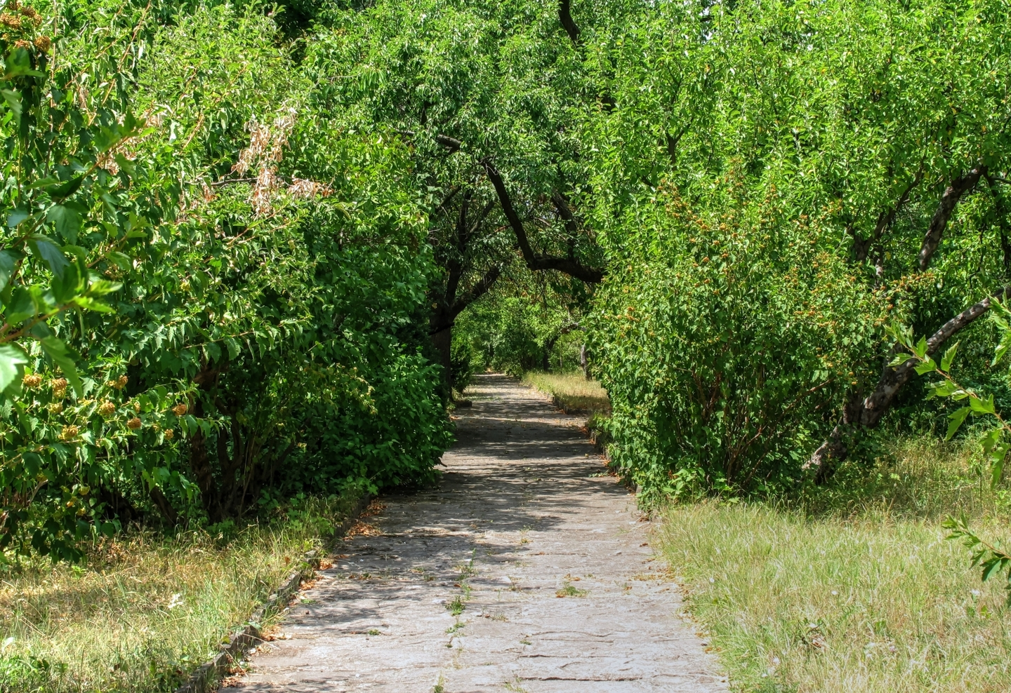 Иванчский парк, монумент природы, находится в Орхейский район, с. Иванча (код MD-OR-map-017)